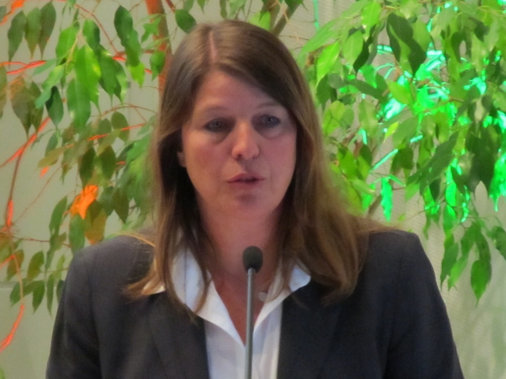 Die Bürgermeisterin von Wilnsdorf, Christa Schuppler, am 26. August 2012 in der FeG Wilden.